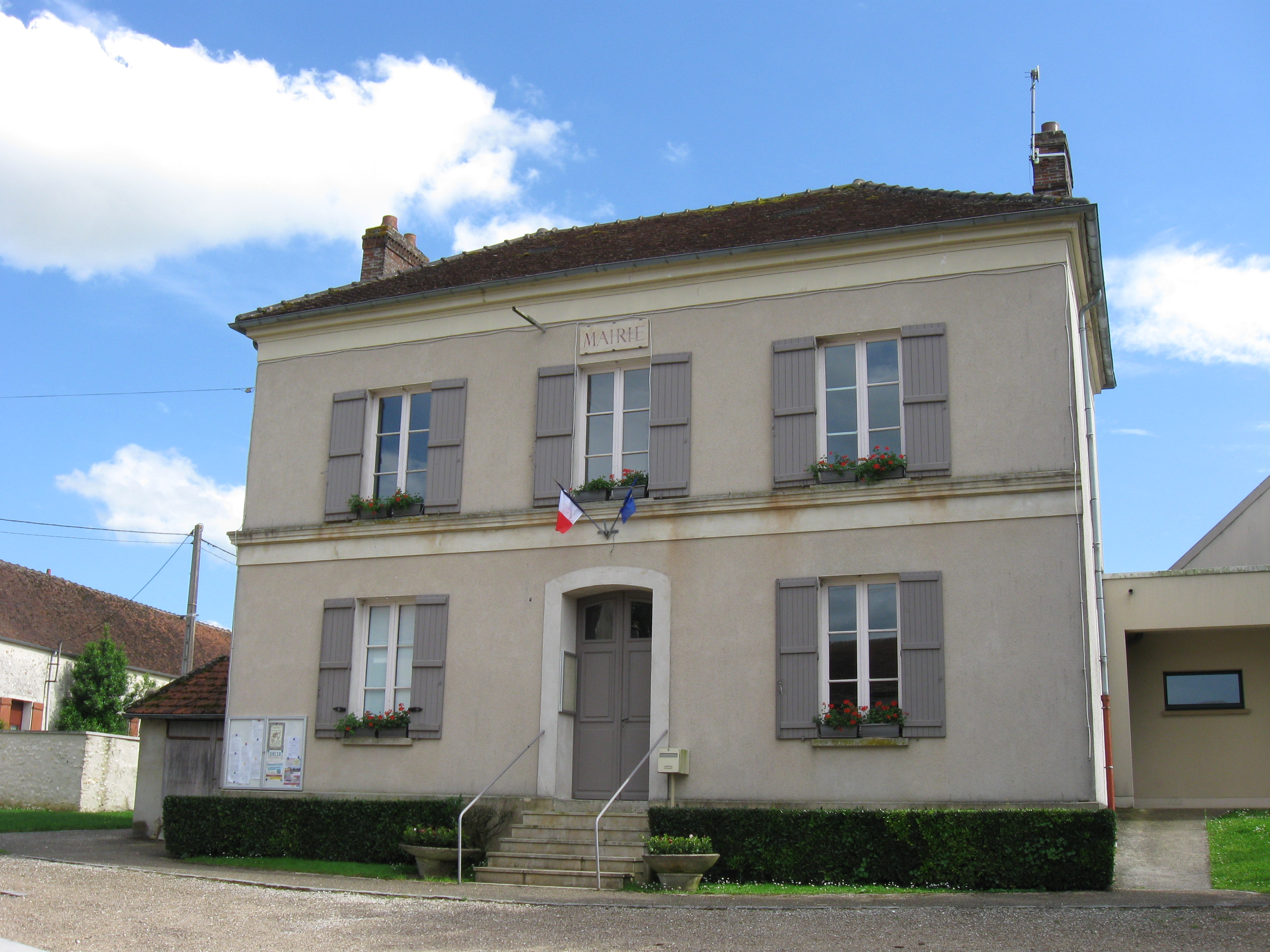 Mairie de Leudon-en-Brie. (Seine-et-Marne, région Île-de-France).